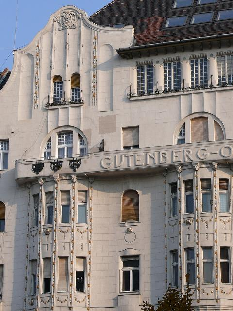 A józsefvárosi Gutenberg-otthon homlokzatának részlete, Budapest (1907)